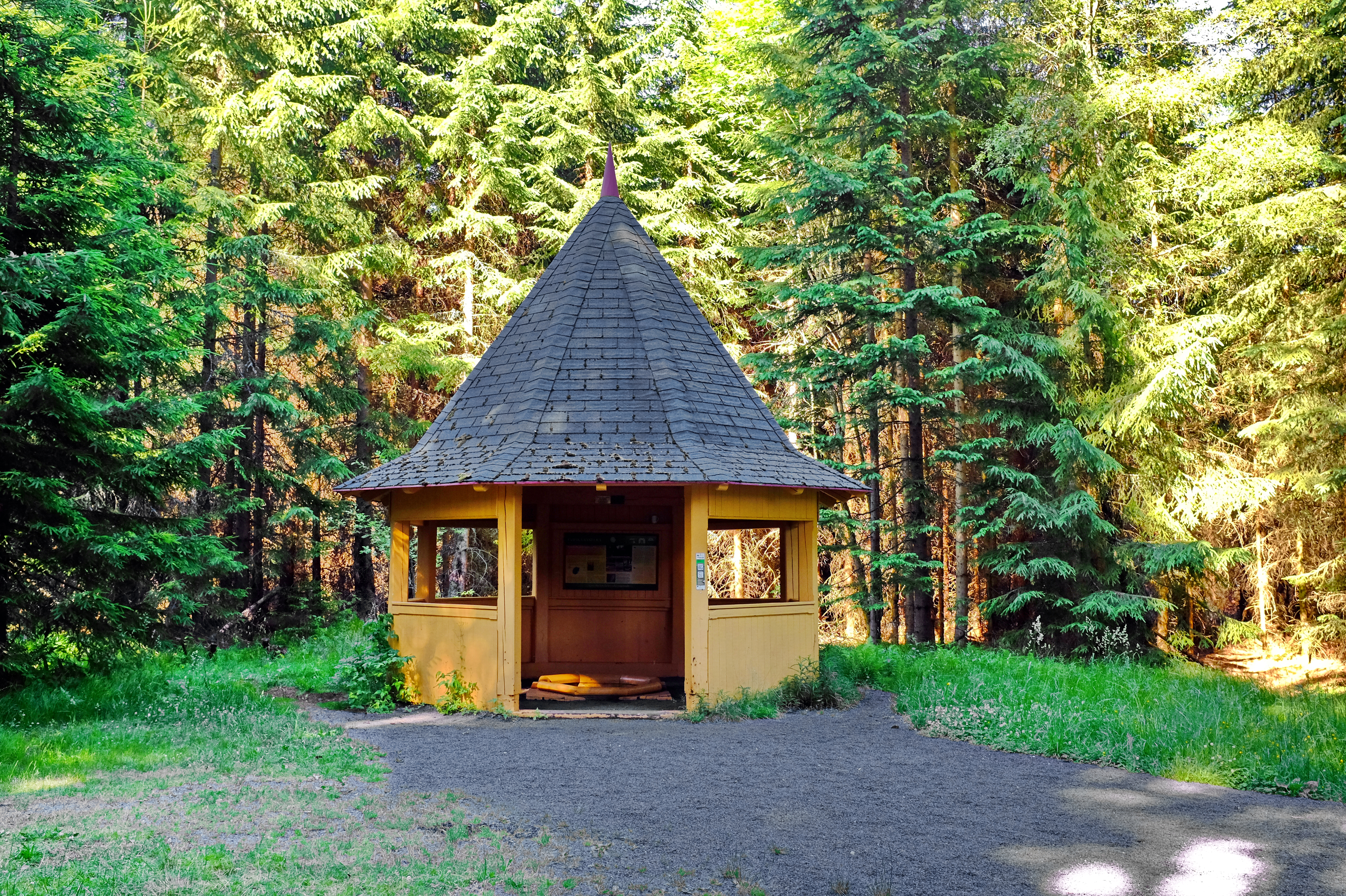 Farská kyselka, Slavkovský les, okres Cheb